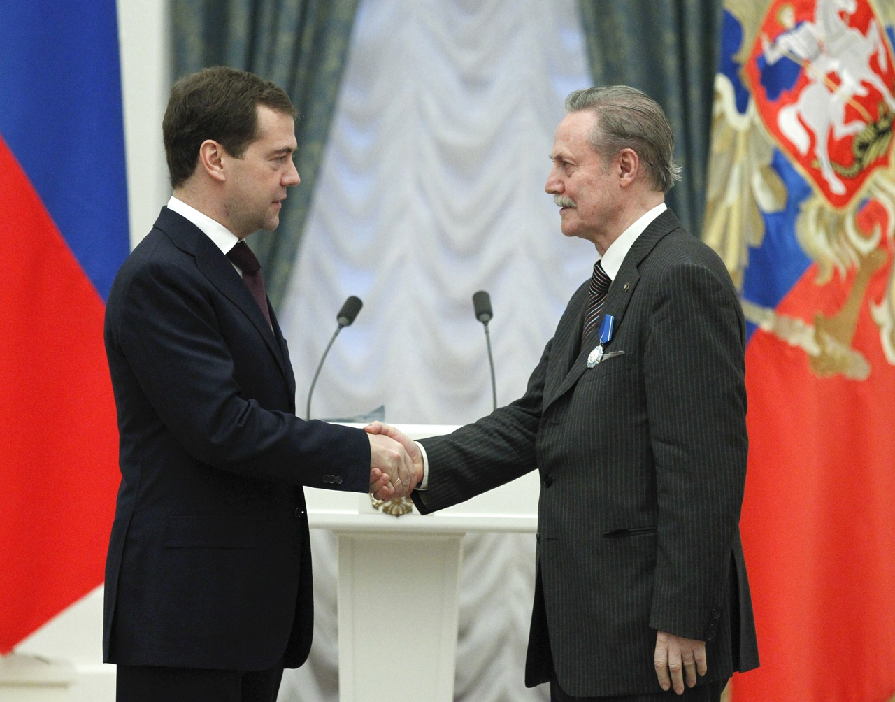 Дмитрий Медведев, Юрий Соломин. Церемония награждения орденом Почёта